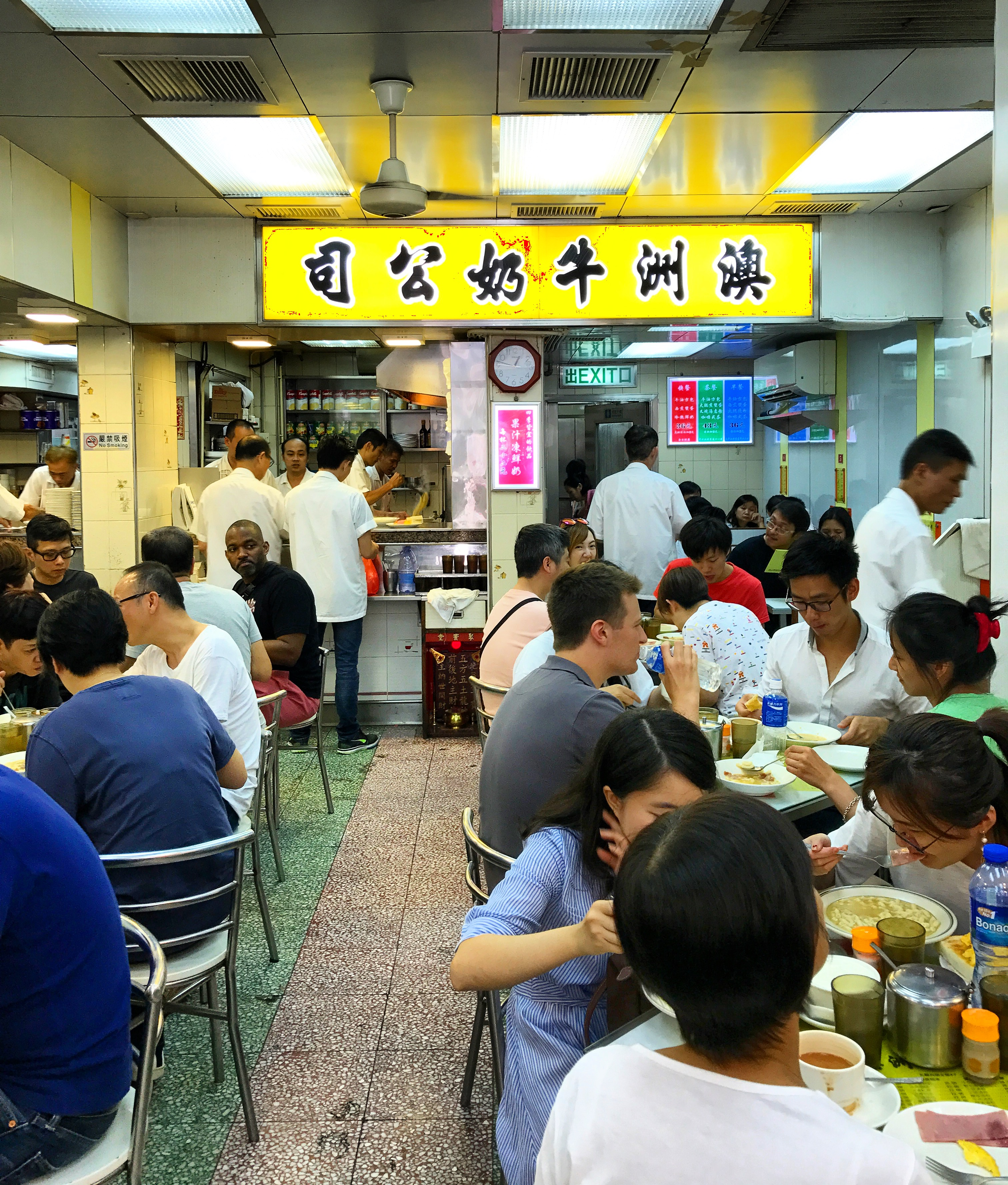 香港 / Hong Kong - 澳洲牛奶公司